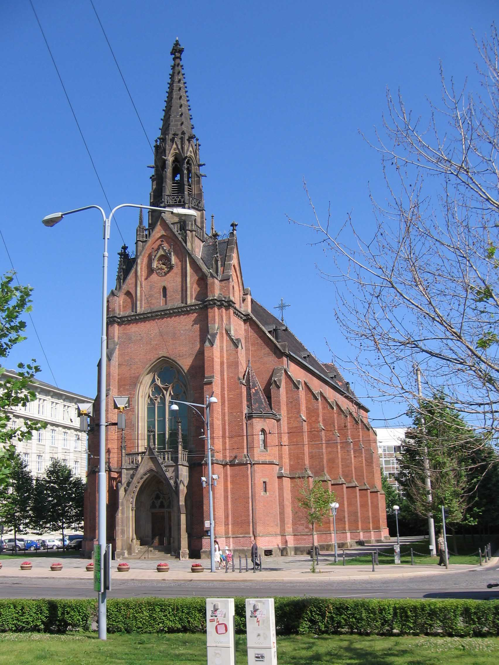 Evangelický chrám Jana Amose Komenského, všeobecně též zvaný „Červený kostel“, v Brně. Pohled z rohu Komenského náměstí a Joštovy ulice.